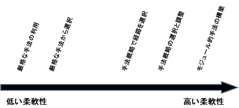 手法構築アプローチにおける柔軟性